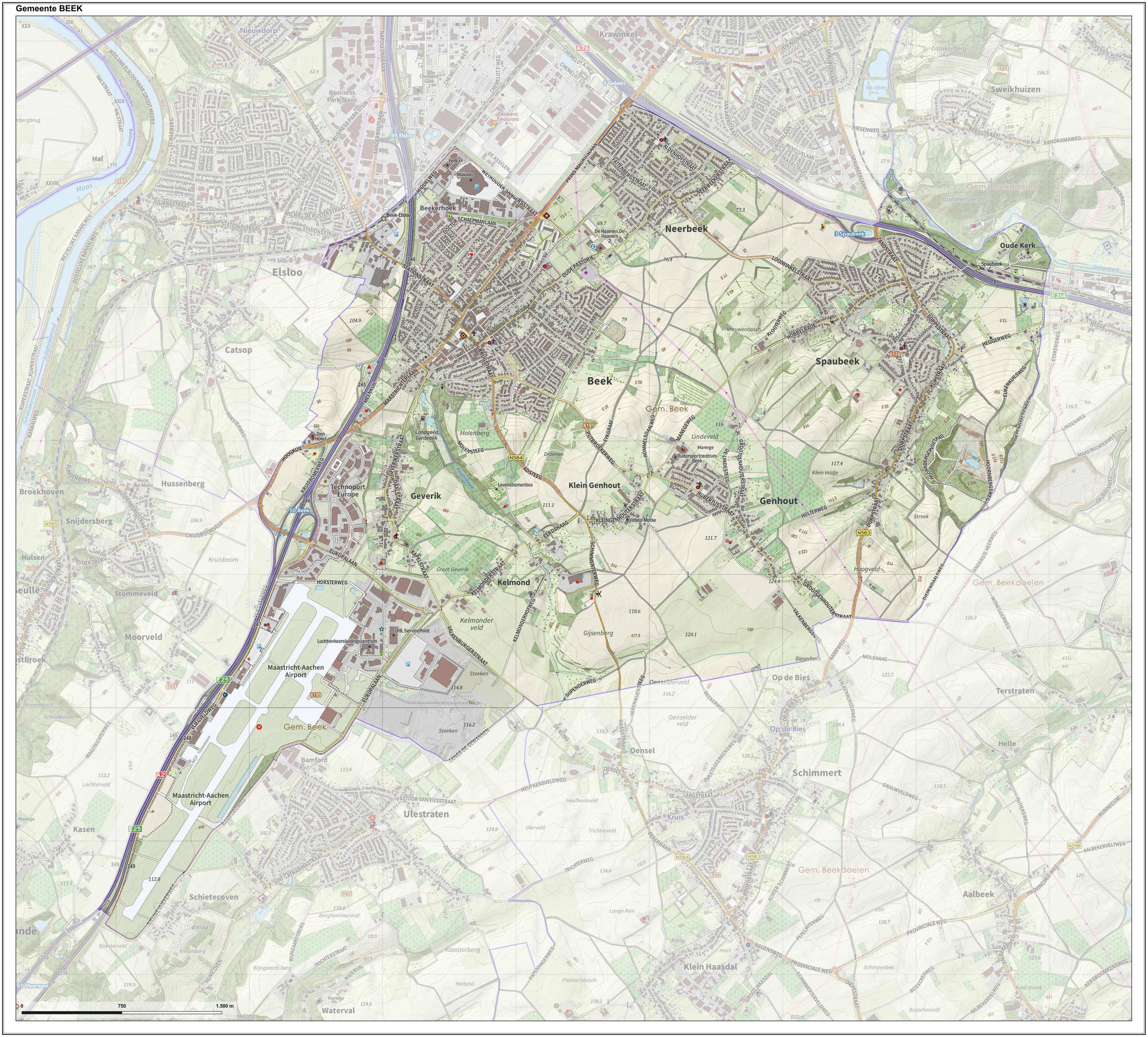 Topografische gemeentekaart. Resolutie: 400 pixels/km. Kaartbeeld samengesteld uit de open geodata van de Top10NL en Top25namen (Kadaster), Creative Commons-BY licentie. Gebouwvlakken uit open geodata BAG extract. Wegen uit de OpenStreetMap, OpenStreetMap community. Reliëfschaduw uit de Actuele Hoogtekaart AHN2. Samenstelling en kleurenschema: Jan-Willem van Aalst, met QGIS. Zie ook de Legenda.